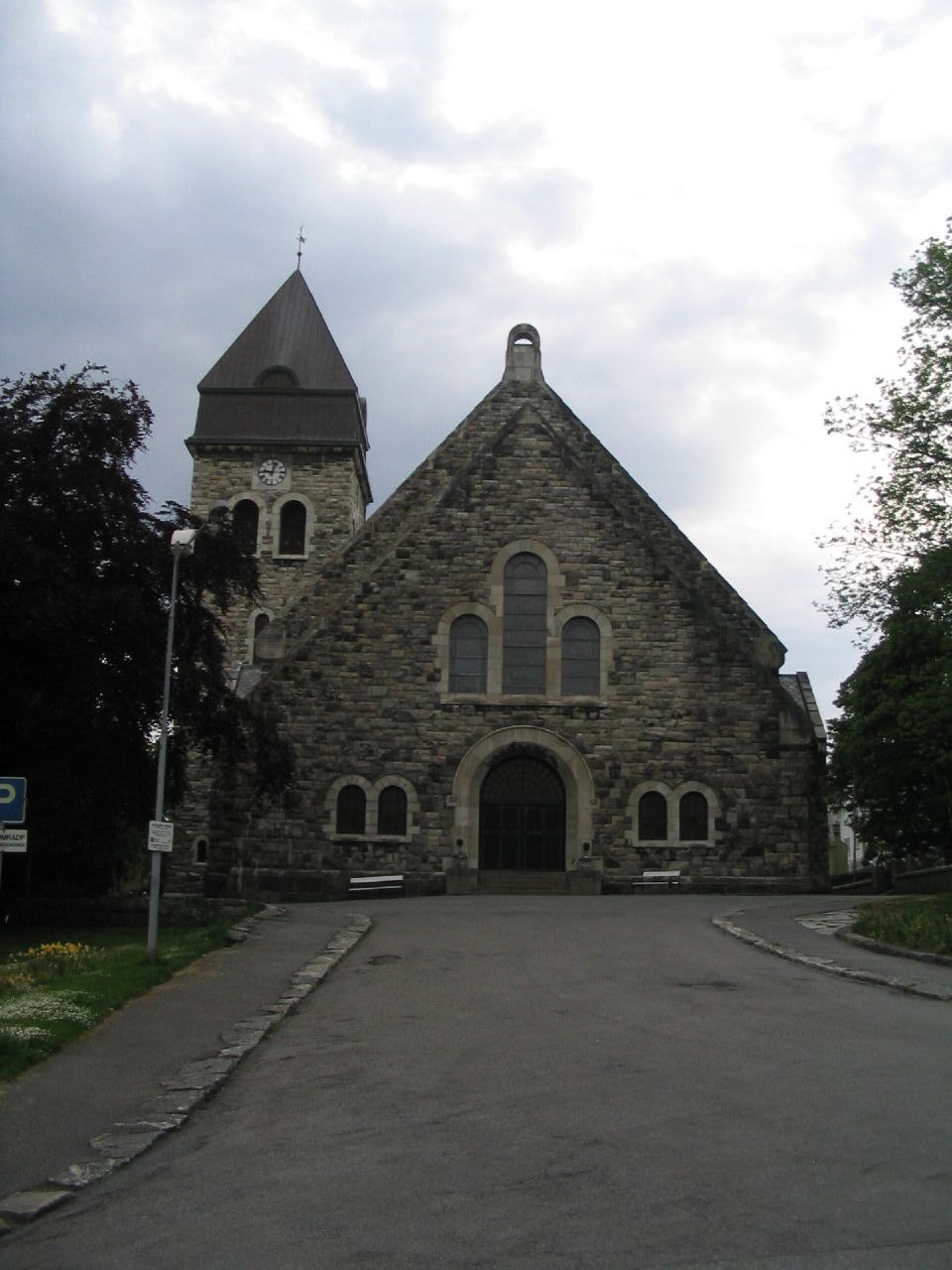 Ålesund kyrkje